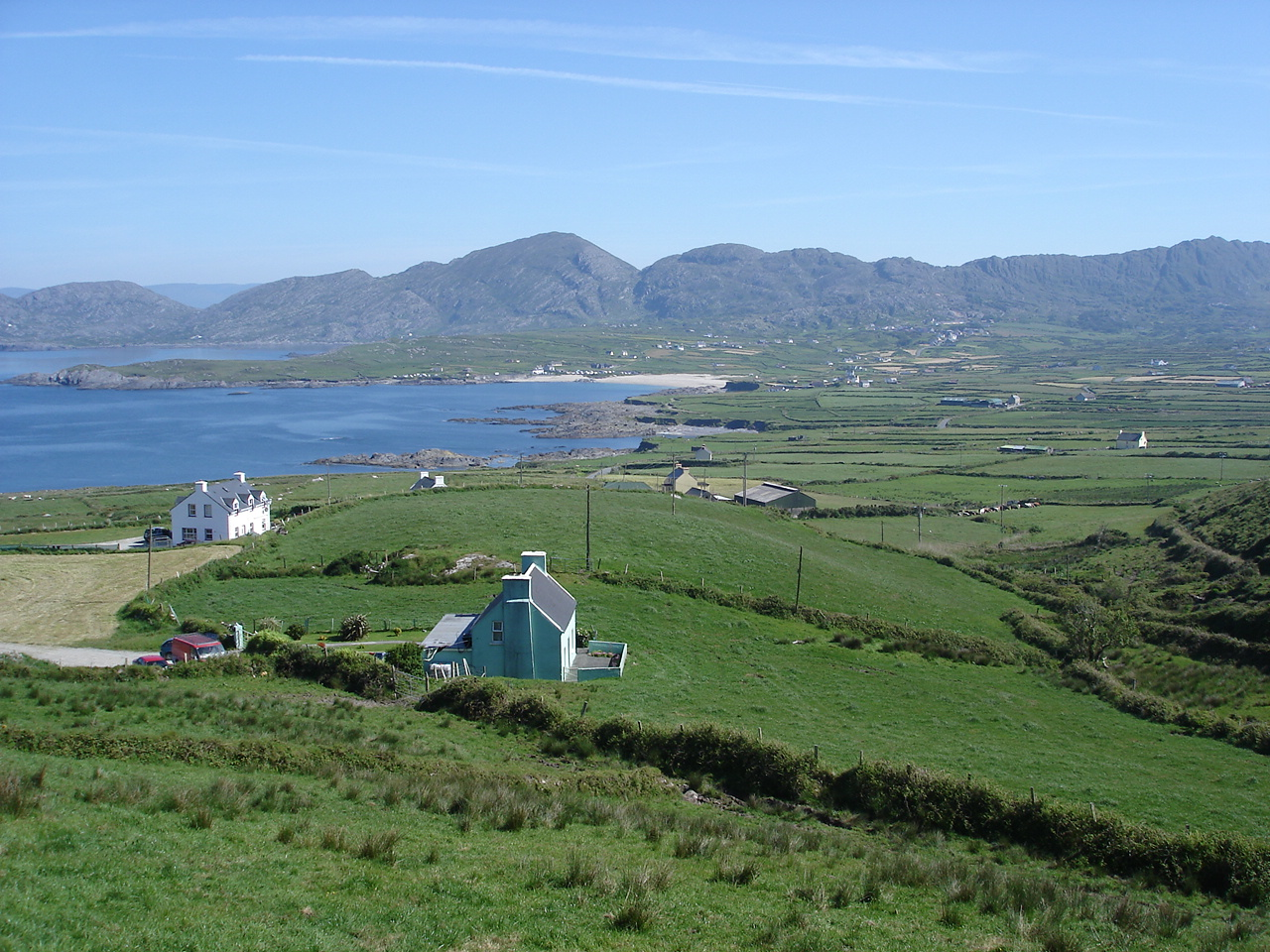 Вид на деревню.